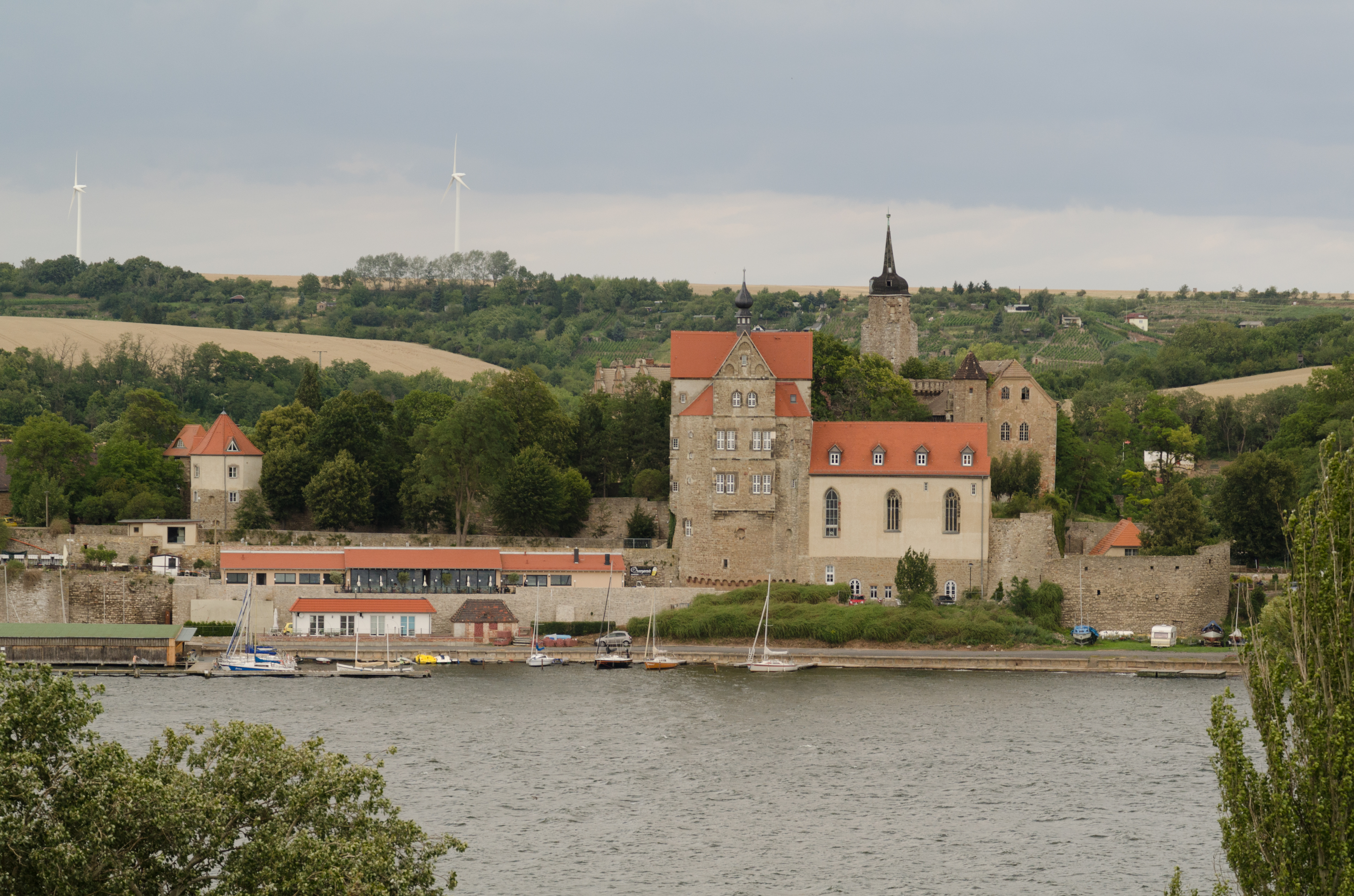 Seegebiet Mansfelder Land, Schloss Seeburg